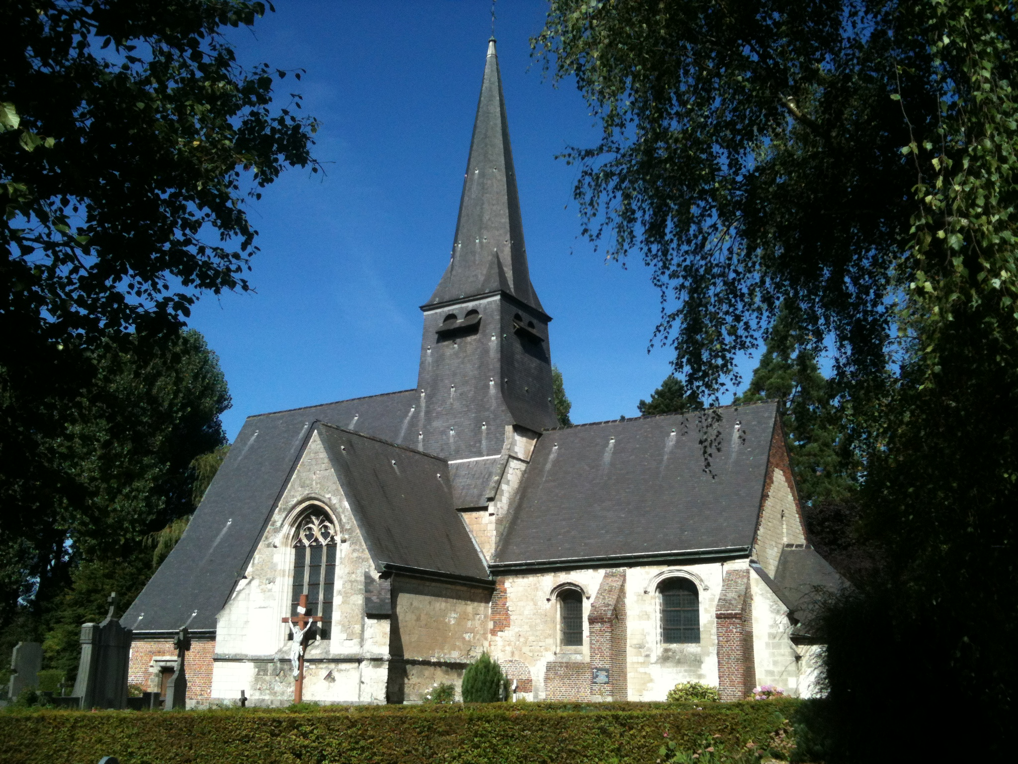 Église Sainte-Marie-Madeleine d'Englos et son cimetière, vus par le sud. .